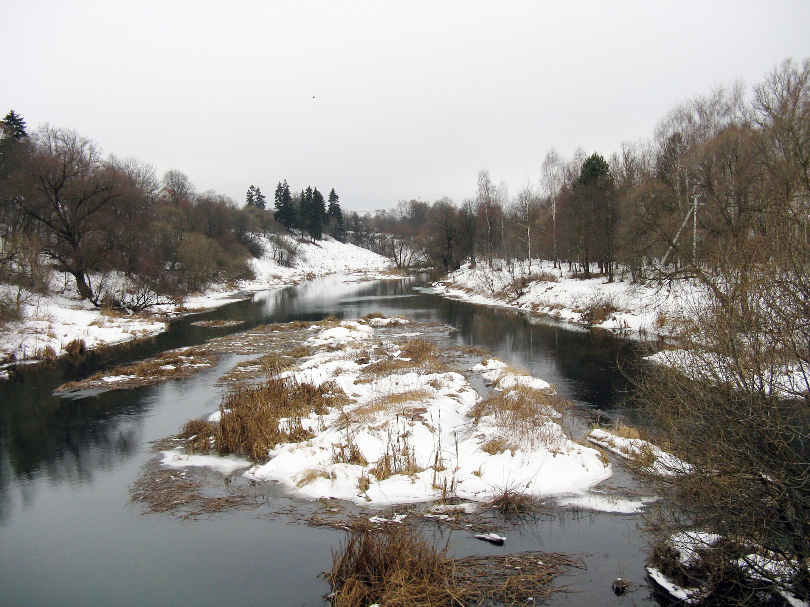 река Протва в районе г. Верея (Московская область); Protva River in Vereya (Moscow Oblast)